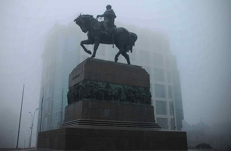 Monumento al General José Artigas. Plaza Independencia. Montevideo.